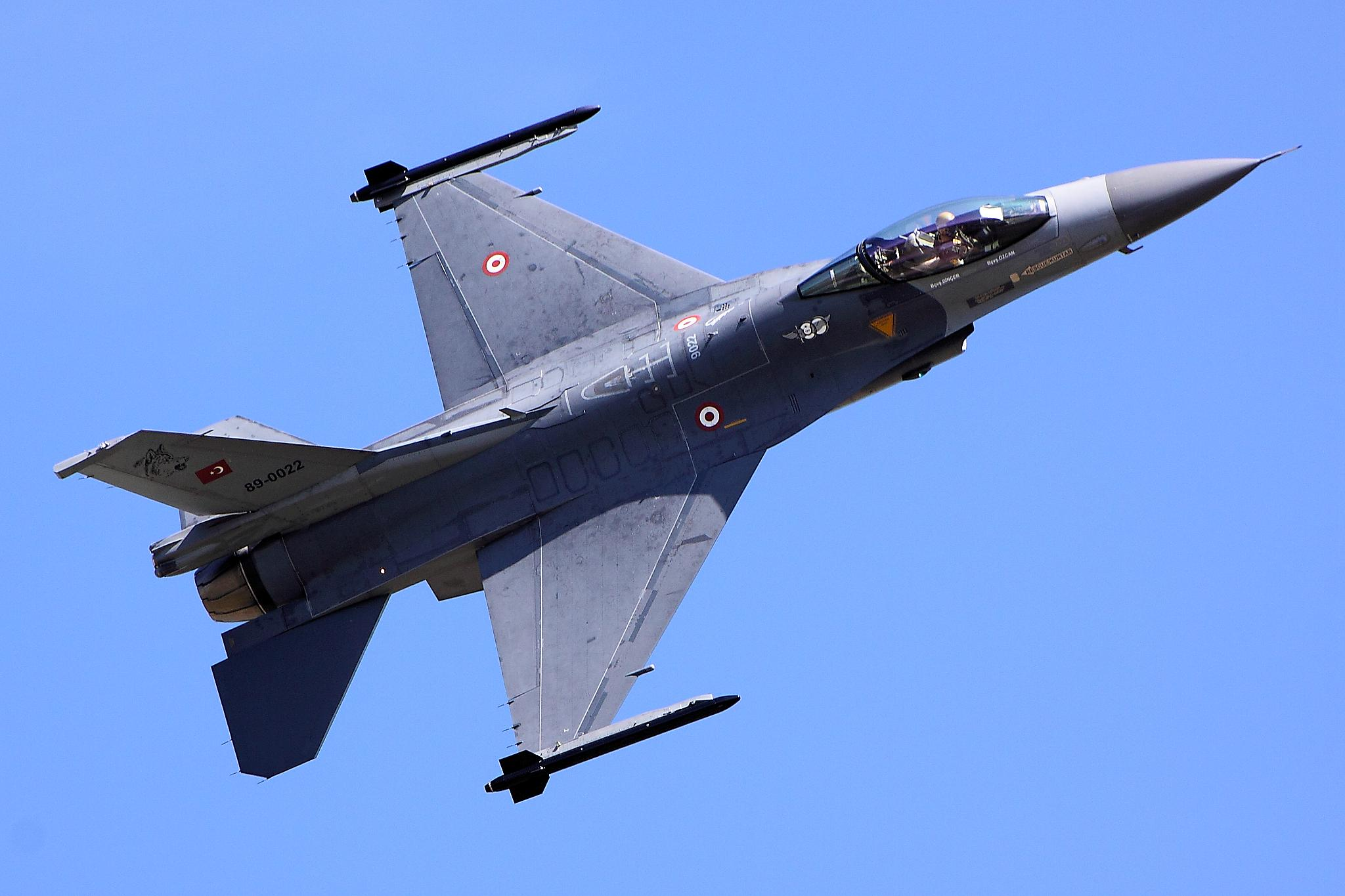 F16 - RIAT 2011